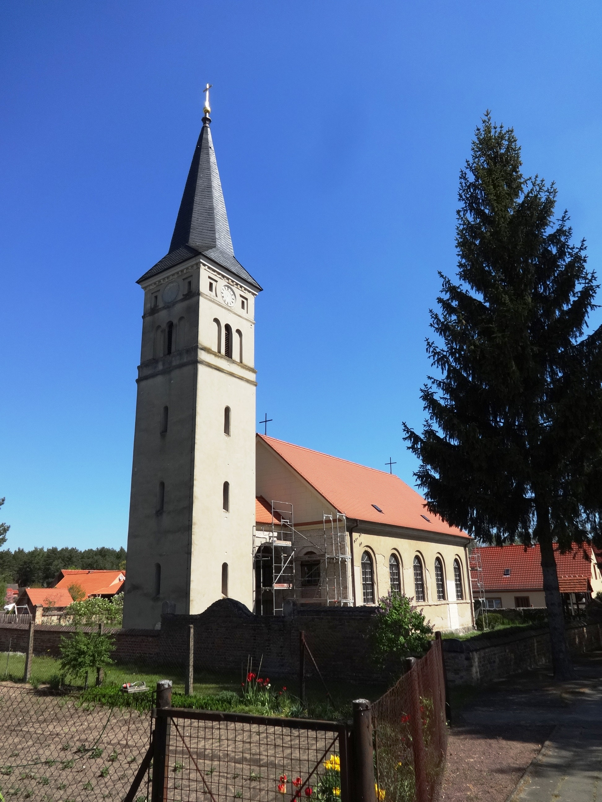 Die Dorfkirche Schäpe ist eine Saalkirche mit Apsis, die im Jahr 1755 errichtet wurde. Im Innern befinden sich eine polygonale Kanzel sowie eine Hufeisenempore aus der Bauzeit der Kirche. Die Orgel stammt aus der Mitte des 19. Jahrhunderts.